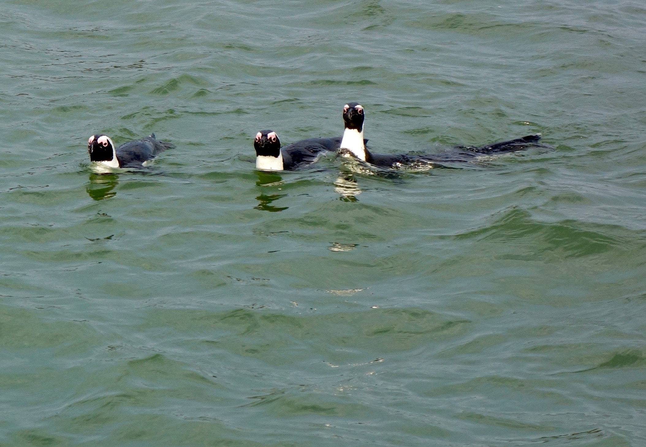 Lüderitz, Namibia